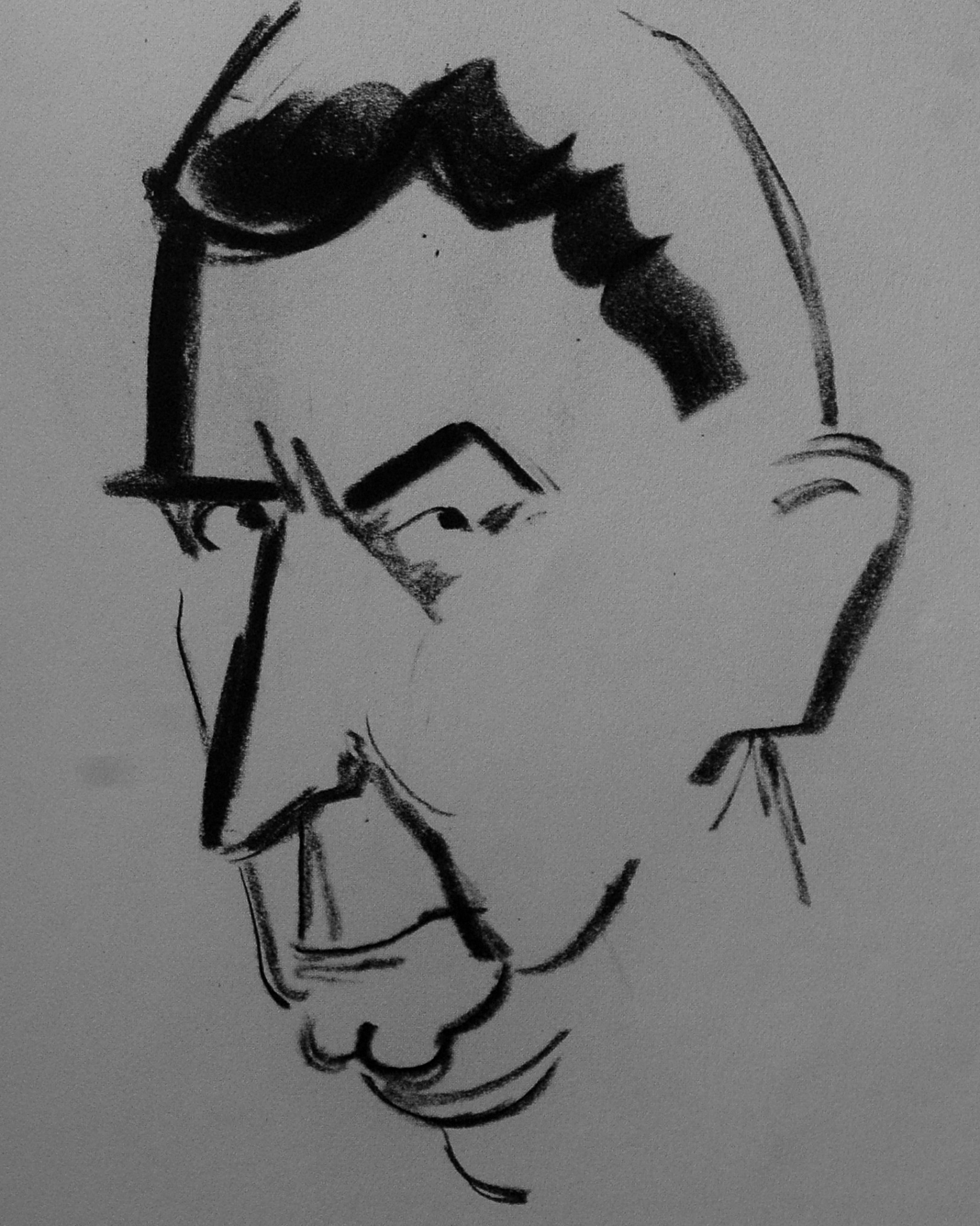 Otte Sköld. Karikatyrteckning av konstnärsvänner utförd av konstnären John Jon-And, utgiven postumt efter hans död 1941 i boken Konstnärer Gebers Förlag.